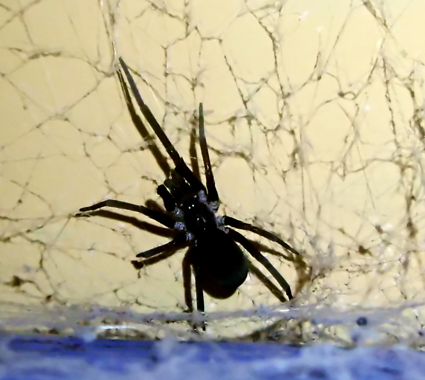 Permitida la distribuicion de este archivo